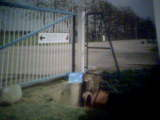 Storteboom.